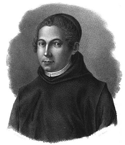 Scansione di libro del XIX secolo